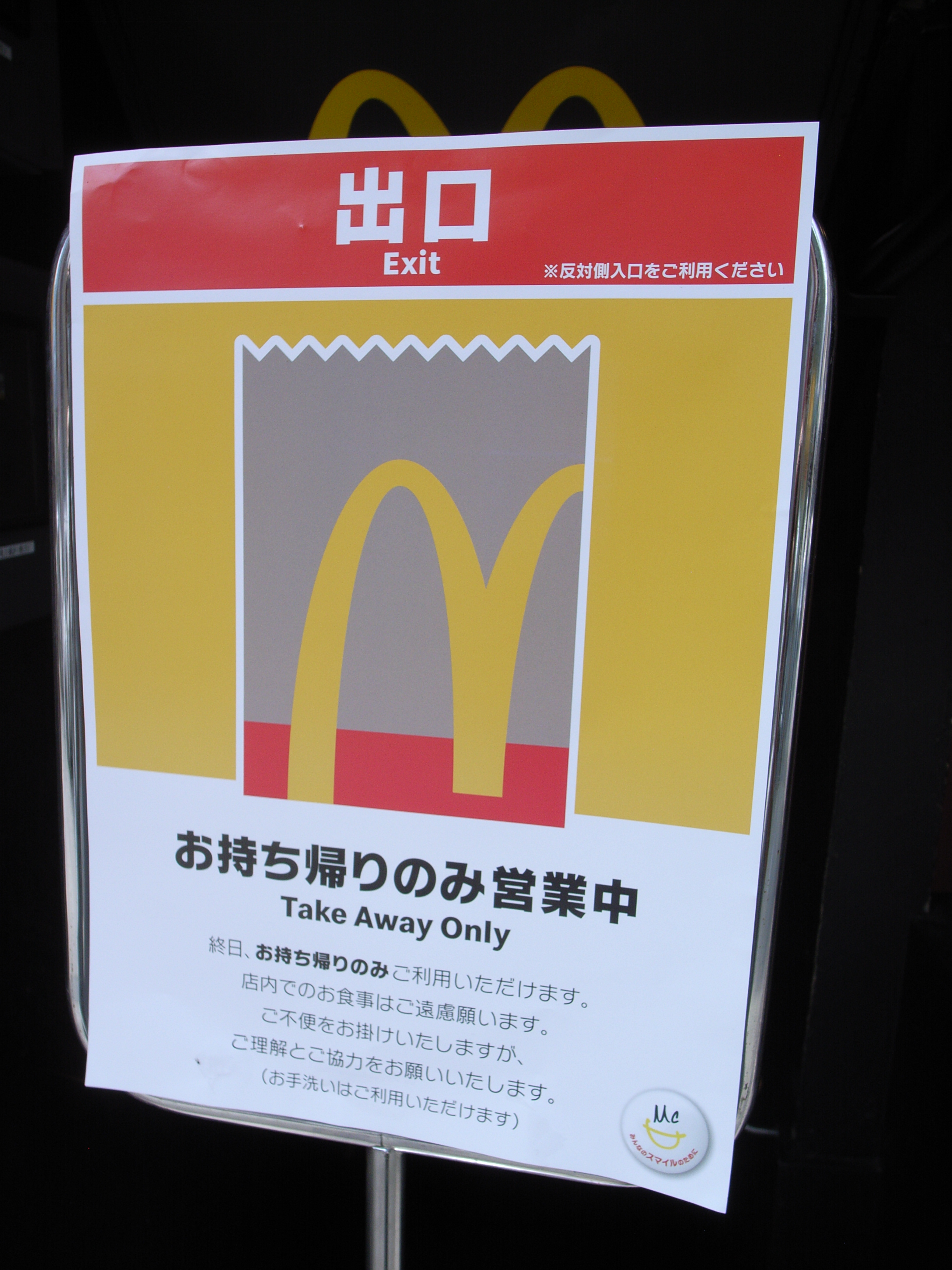 新型コロナウイルスでマクドナルドは客席を閉鎖してテイクアウト専門化。